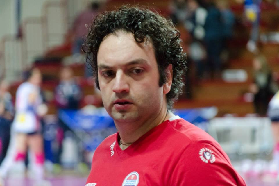 Allenatore italiano di pallavolo